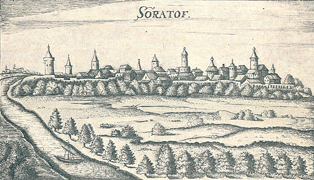 Саратов